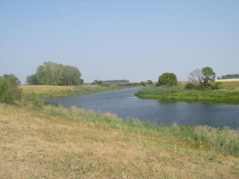 Река Солонка. Мордовский район. Тамбовская область